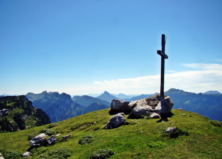 Sommet du Pinet ou Le Truc en Chartreuse , la croix , vue sur les Lances de Malissard au sud.